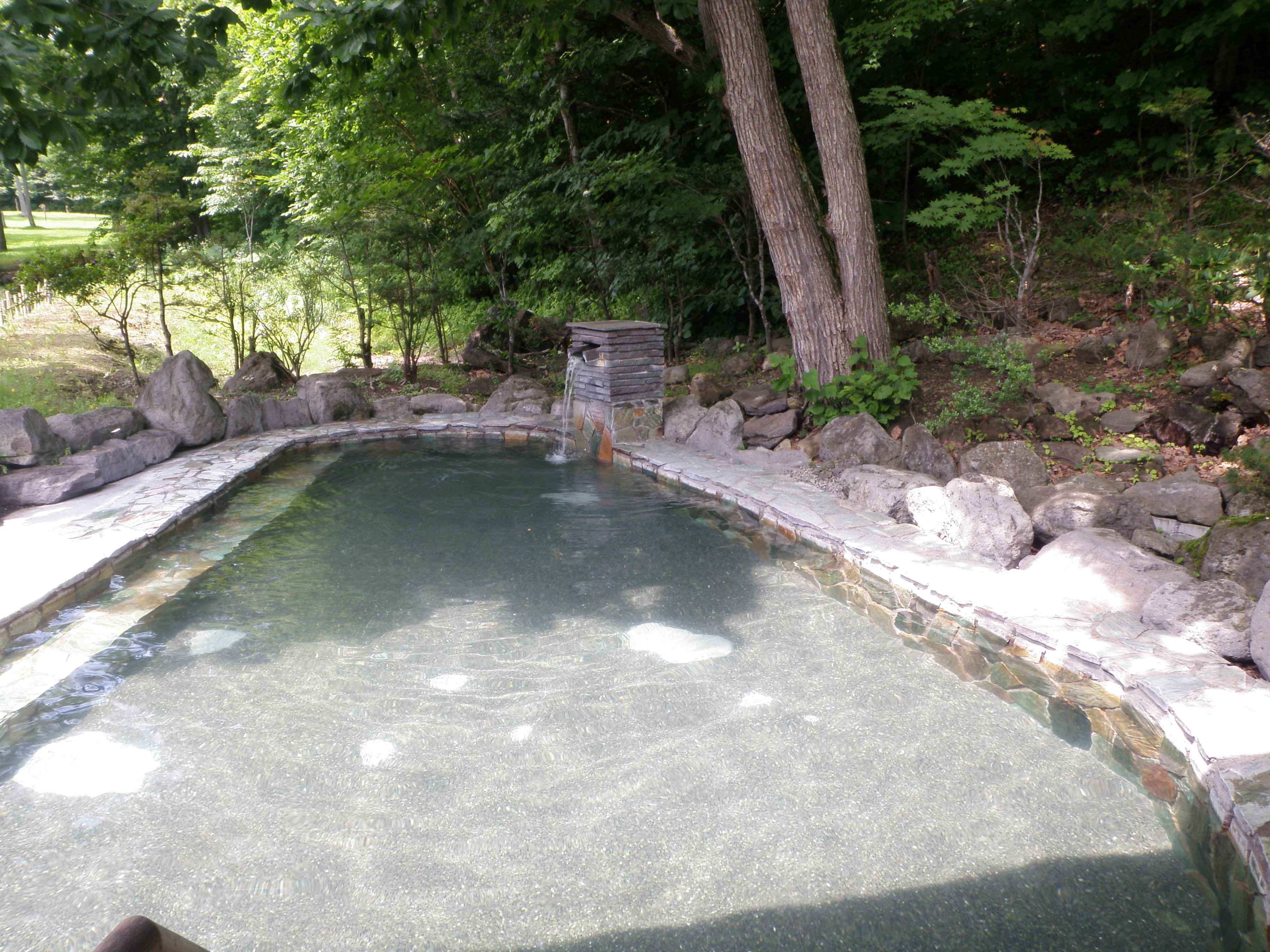 北見市の塩別つるつる温泉露天風呂